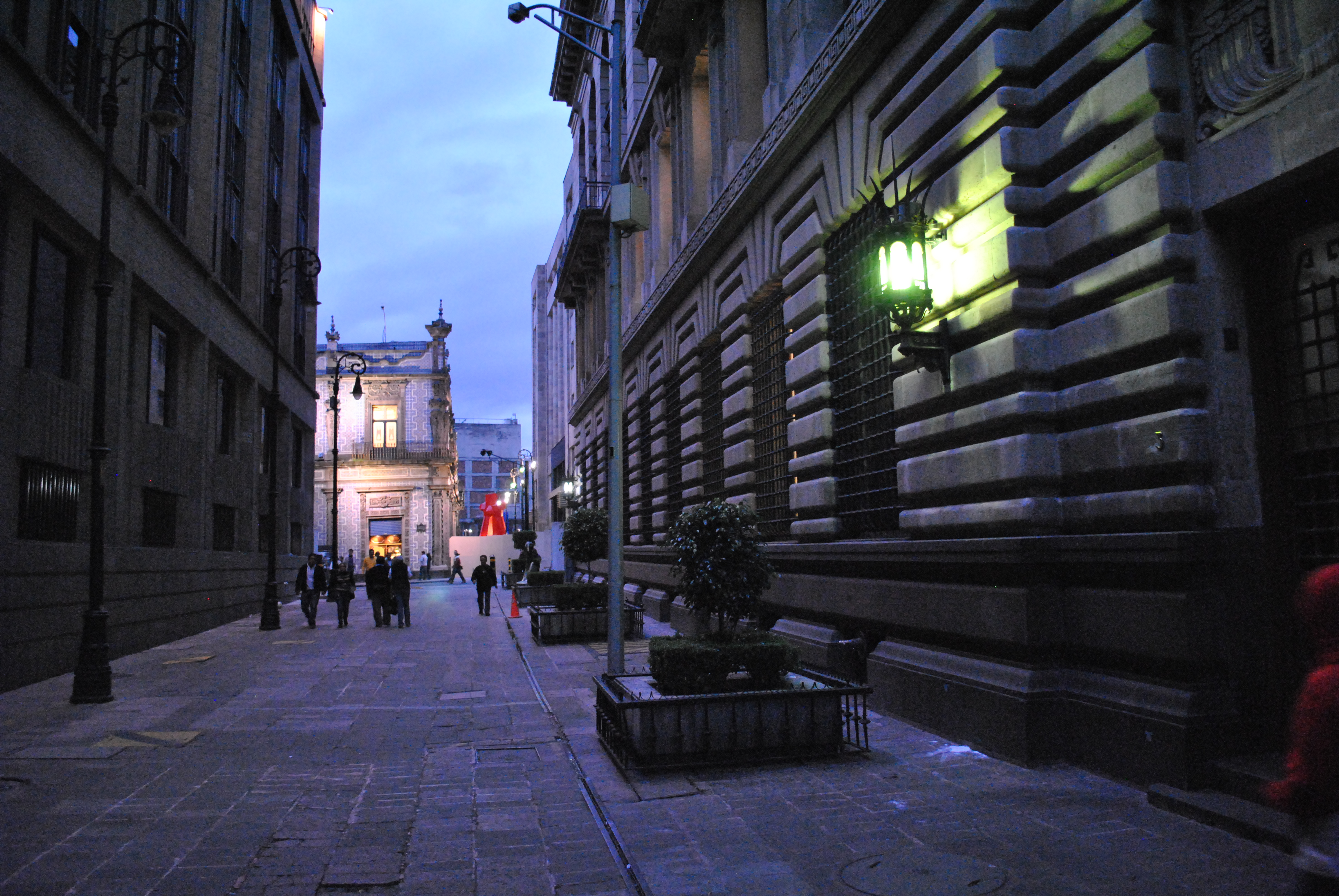 Calle Condesa en el Centro Historico de la Ciudad de México